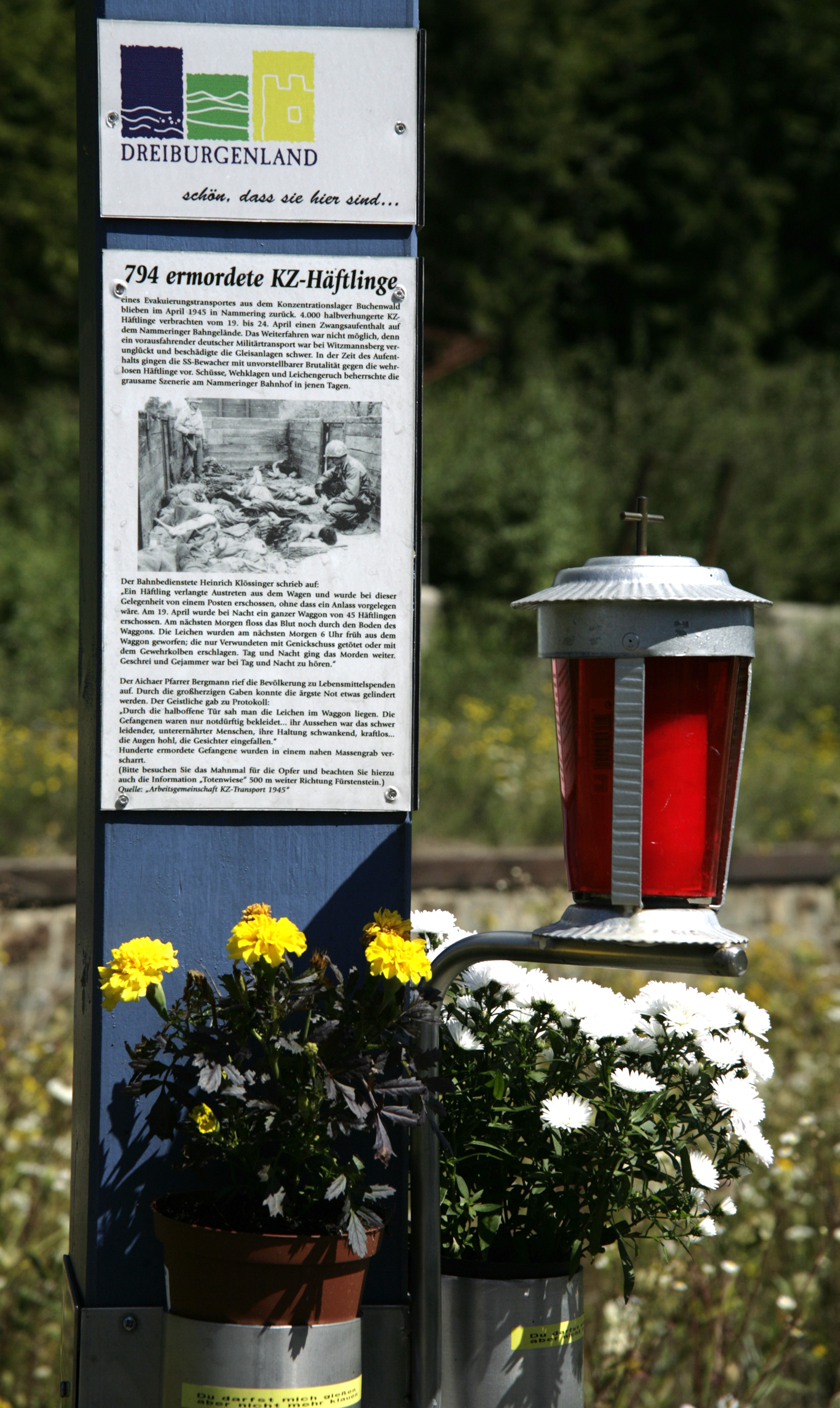 Gedenktafel am Mahnmal KZ-Transport 1945 bei Nammering.